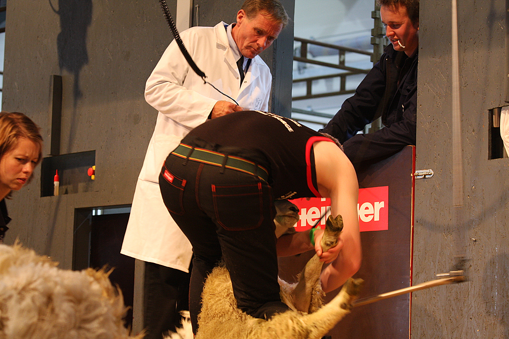 Fra mesterskapet I Bjerkreim